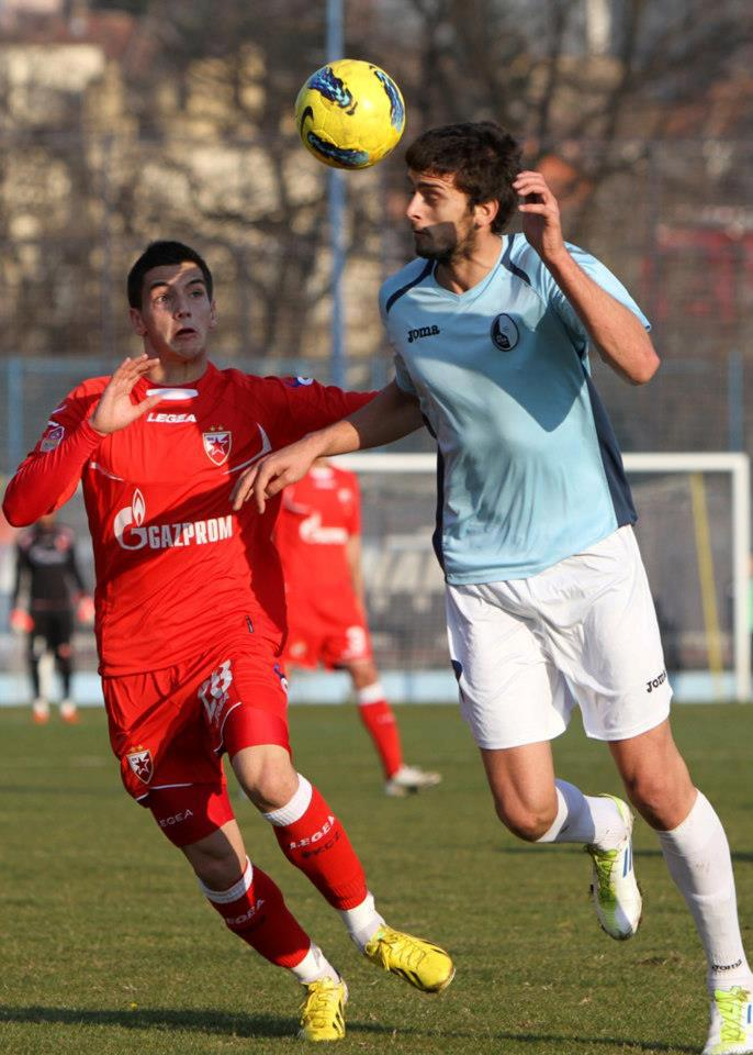 Jagodic u duelu sa Savicevicem.